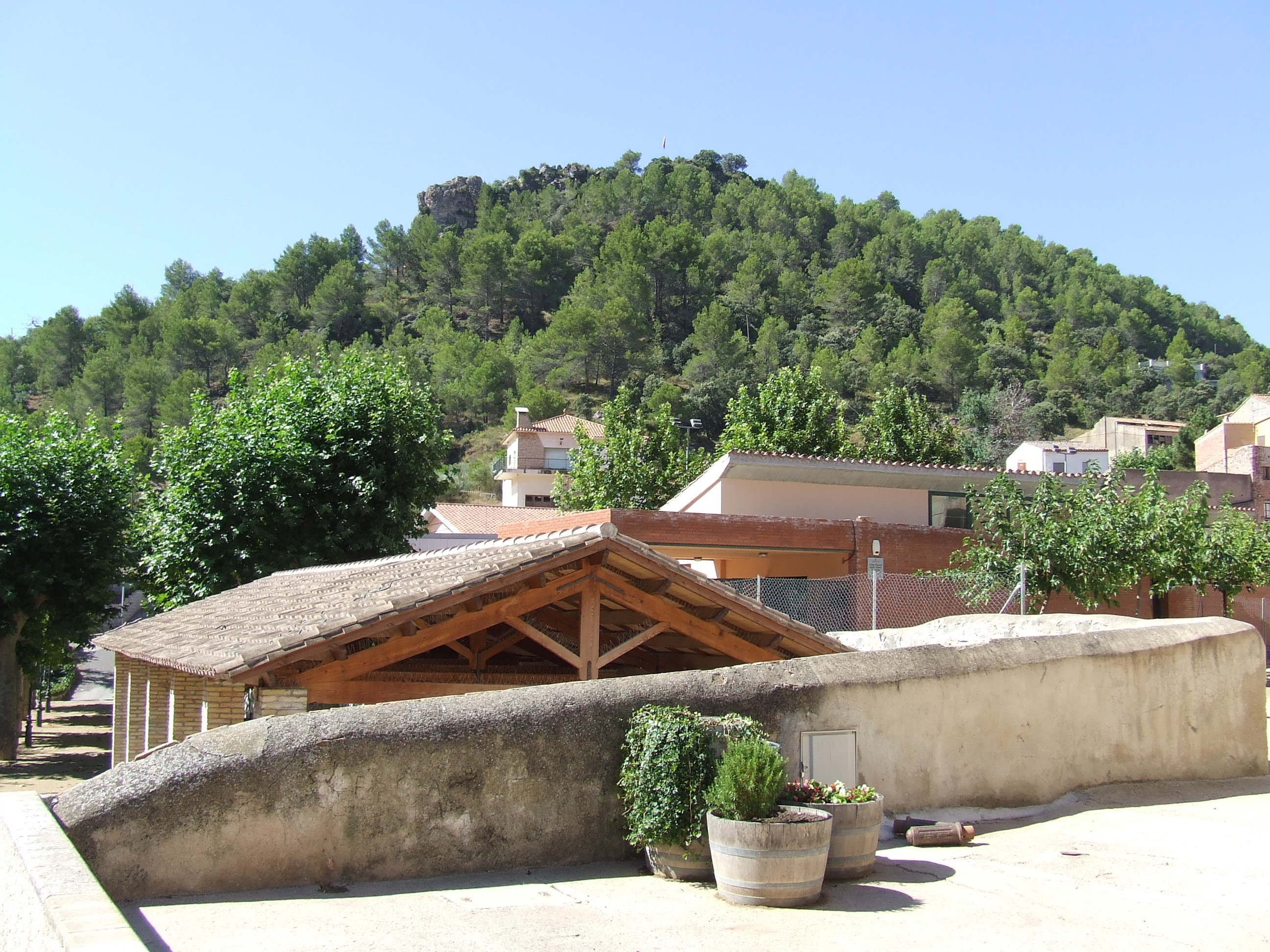 La Miloquera des del centre del poble de Marçà, al costat dels safareigs i de l'escola pública.